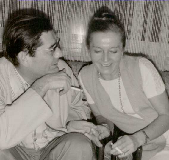 Herbert Thomas Mandl - Selbst fotografiert. Eigenes Privatfoto aus den 70er Jahren